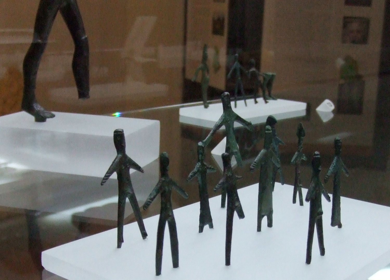 Bronzetti étrusques au musée archéologique national de l'Ombrie de Pérouse